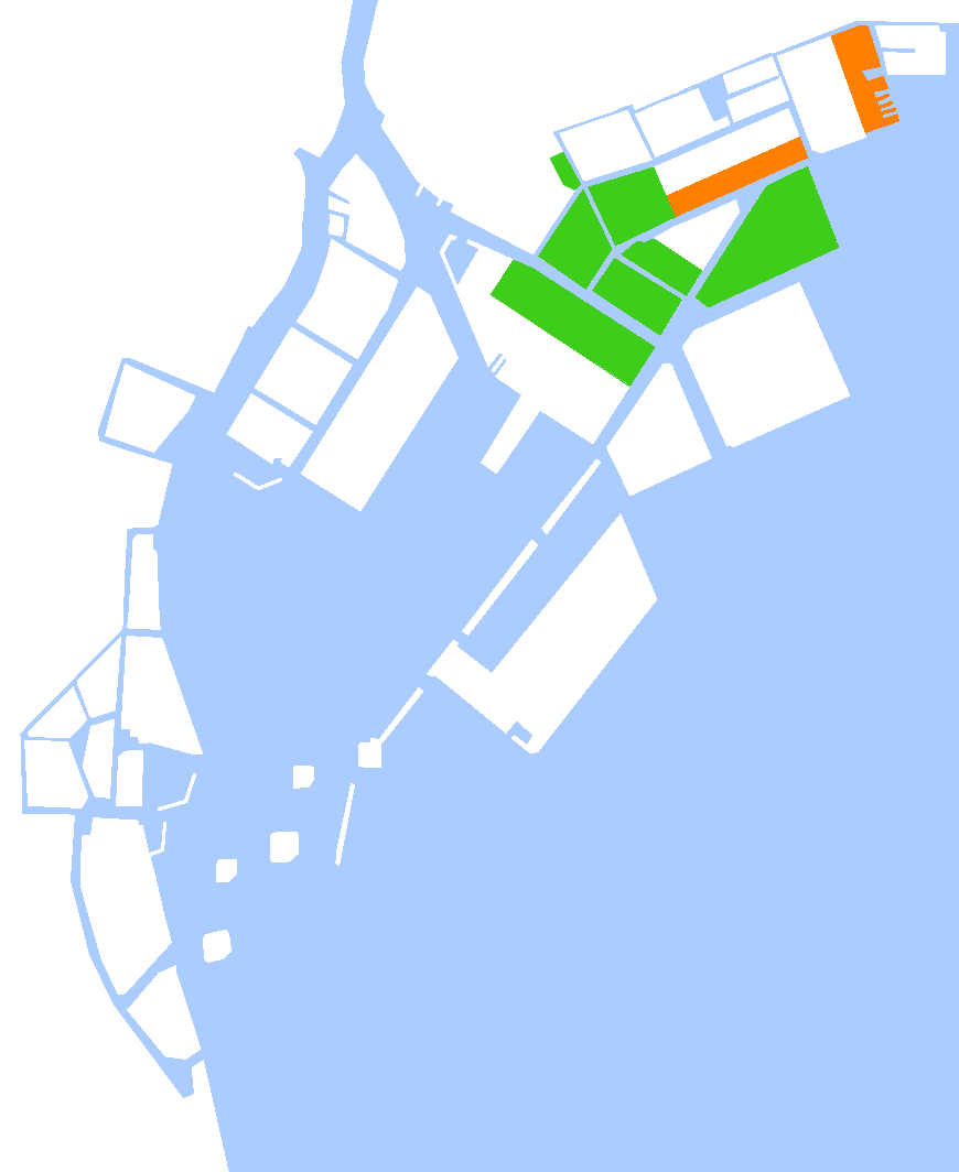 枝川周辺の埋め立ての歴史。緑は1910年～1923年の枝川改修工事、オレンジは1938年～1945年の越中島駅敷地造成事業の地域（1965年は除く）